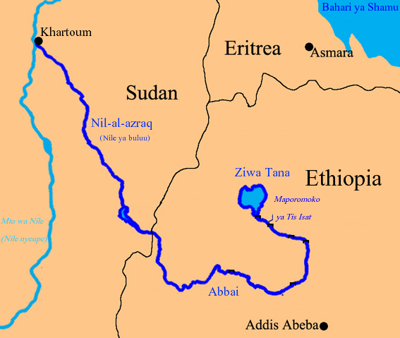 Kutokana na Image:Niloazul.jpg. Imesahihishwa kwa ajili ya sw.wikipedia na User:Kipala. 22:40, 28 Aprili 2006 Kipala 567x479 (136560 bytes) 22:36, 28 Aprili 2006 Kipala 852x1136 (154021 bytes) (kutokana na Imesahihishwa kwa ajili ya sw.wikipedia na kipala)